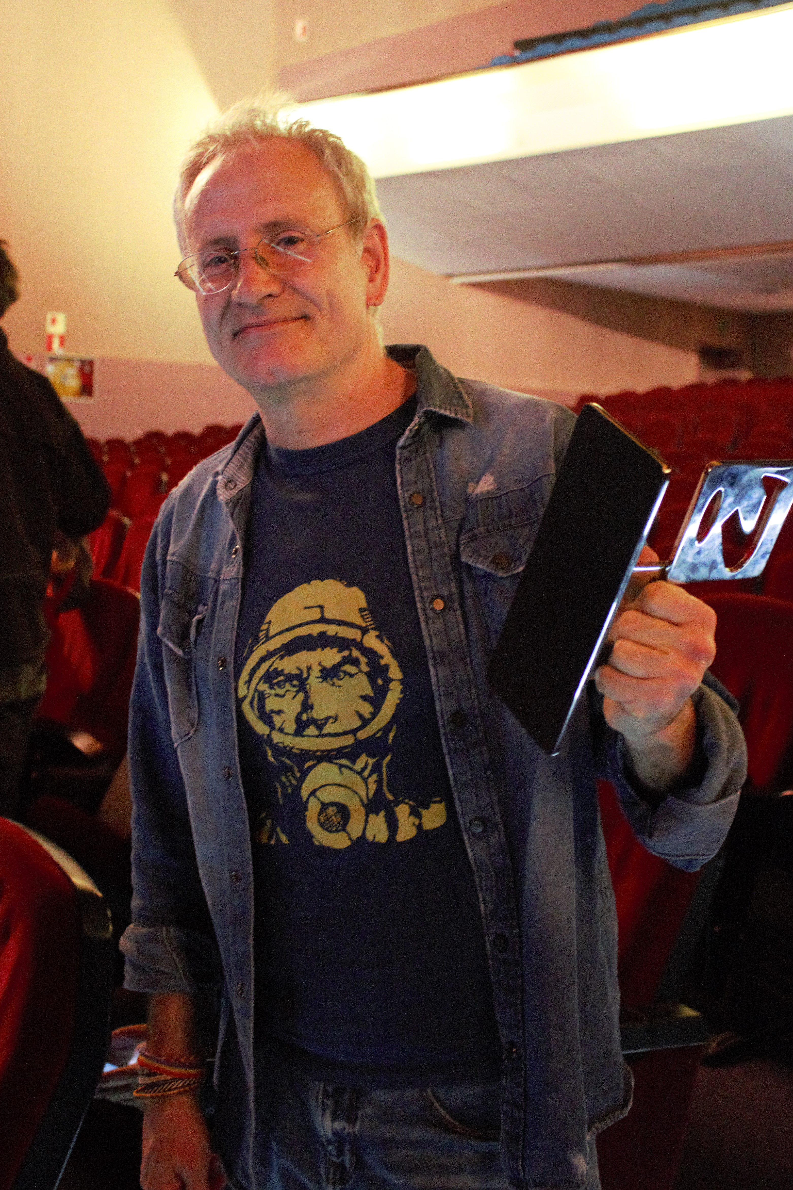 L'autor de còmic Ángel de la Calle amb el guardó a la mà i just després d'haver obtingut el premi a la millor obra per "Pinturas de guerra". Saló Internacional del Còmic de Barcelona, 2018.